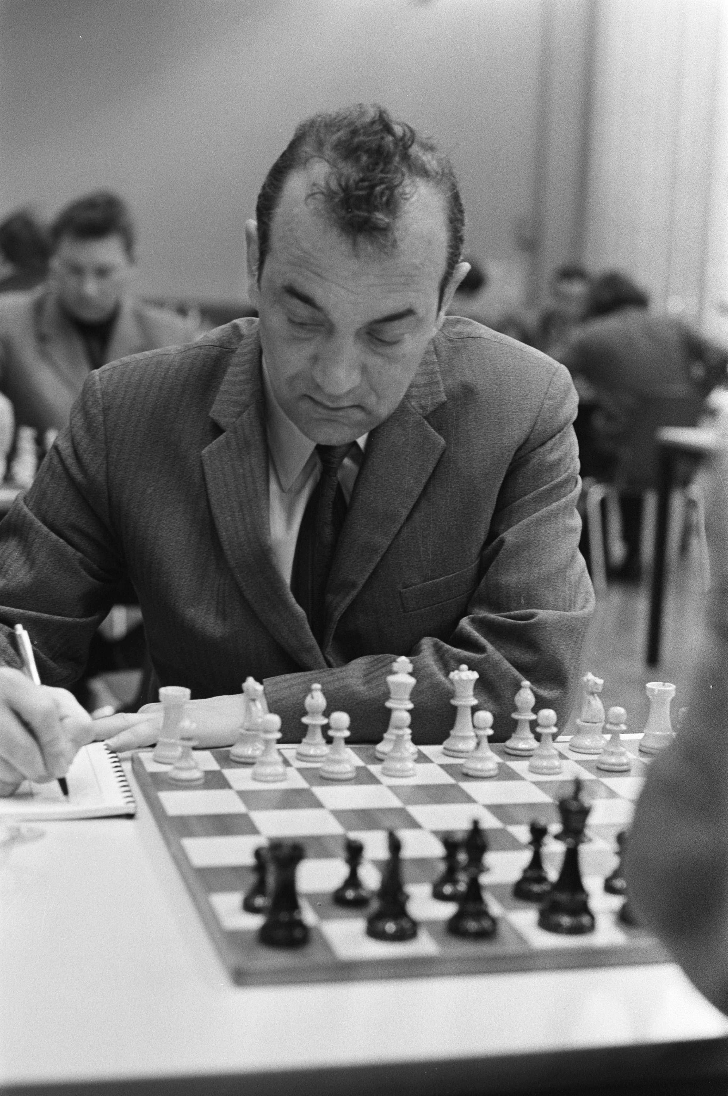 Schaker Viktor Kortsjnoj. Eerste ronde IBM-schaaktoernooi 1972 in de RAI te Amsterdam.